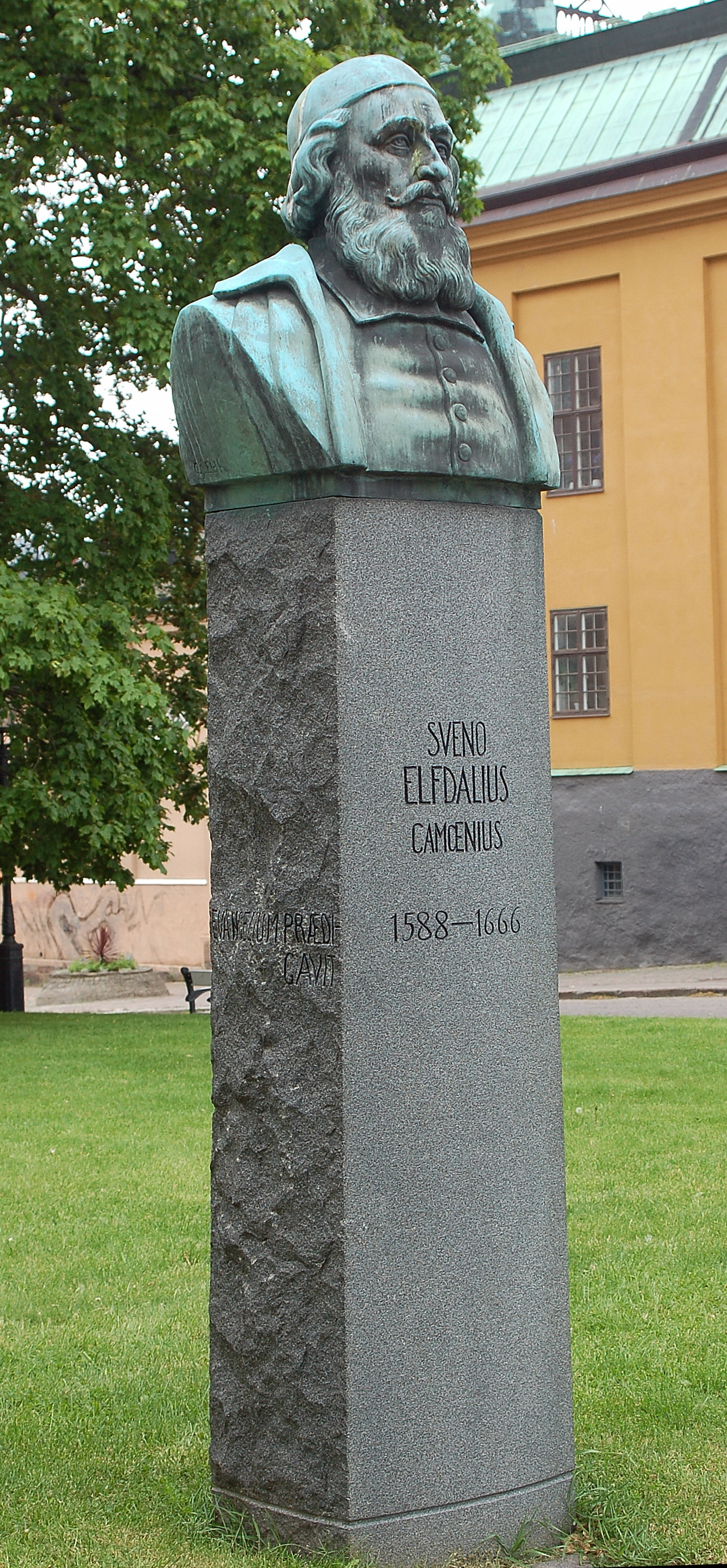 Sveno Elfdalius bronsbyst av Carl Eldh. På granitpelaren. finns inskriptionen SVENO ELFDALIUS CAMCENIUS 1588-1666 På pelarens norra sida är finns inskriptionen EVANCELIUM PRAEDI- CAVIT och på Södra sidan står det GYMNASIUMCONDIDIT.